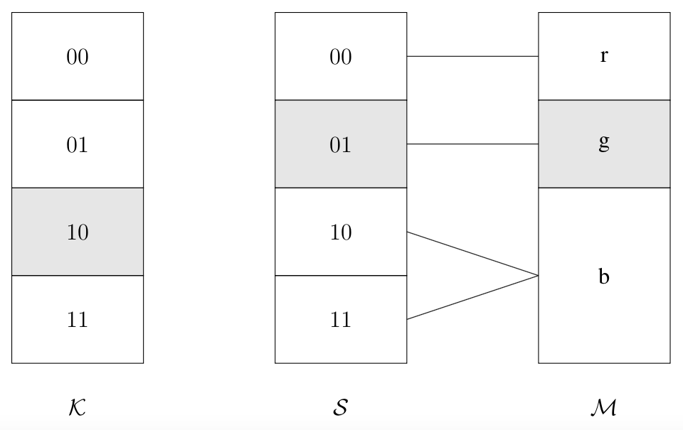 Eine Visualisierung des Beispiels der Honey Encryption.